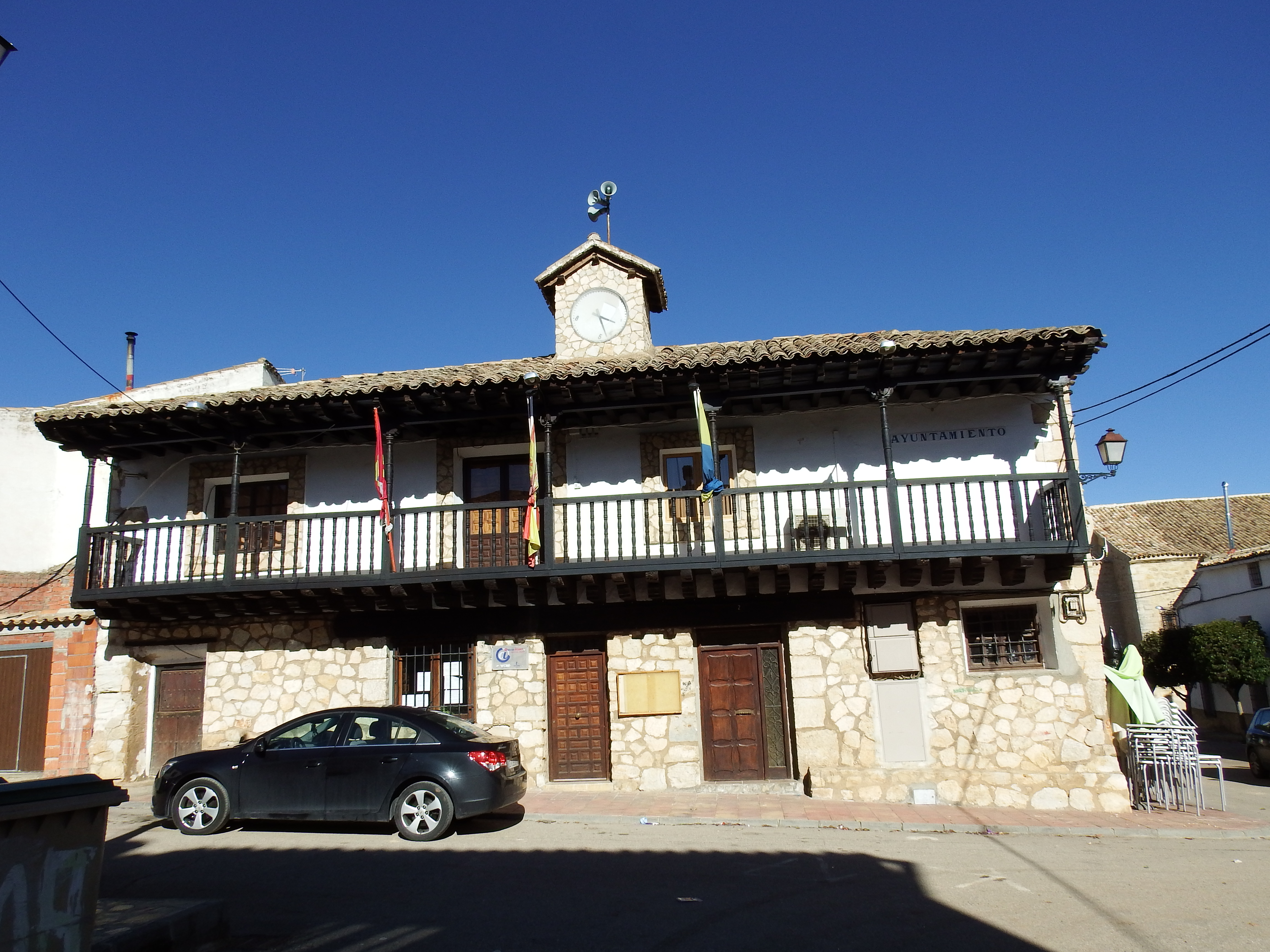 Ayuntamiento de Olmeda del Rey